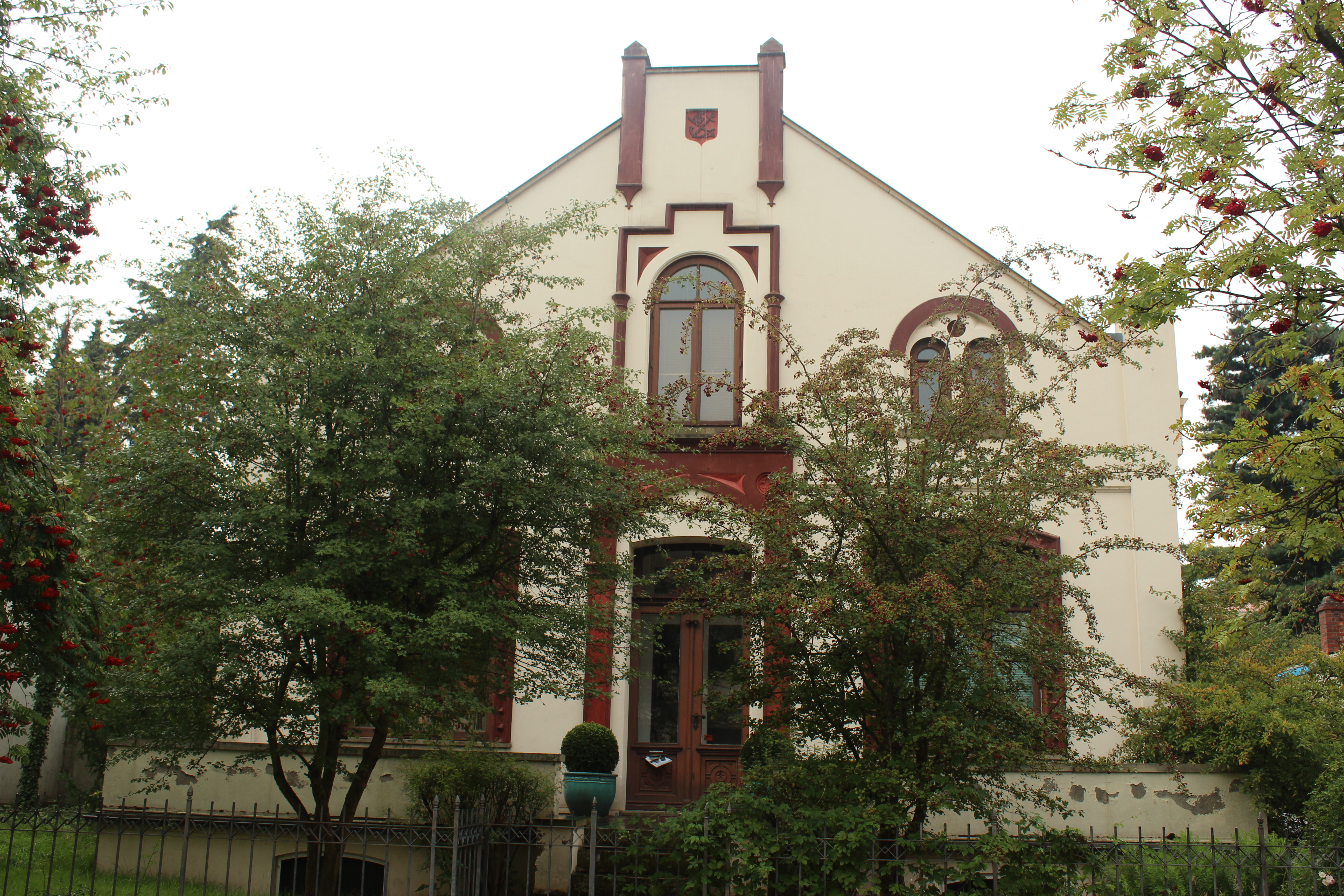 Haus Bosmann in Bremen, Jaburgstraße 6.Das abgebildete Objekt ist ein geschütztes Kulturdenkmal in der Freien Hansestadt Bremen, mit der Nr. 1286 beim Landesamt für Denkmalpflege registriert.